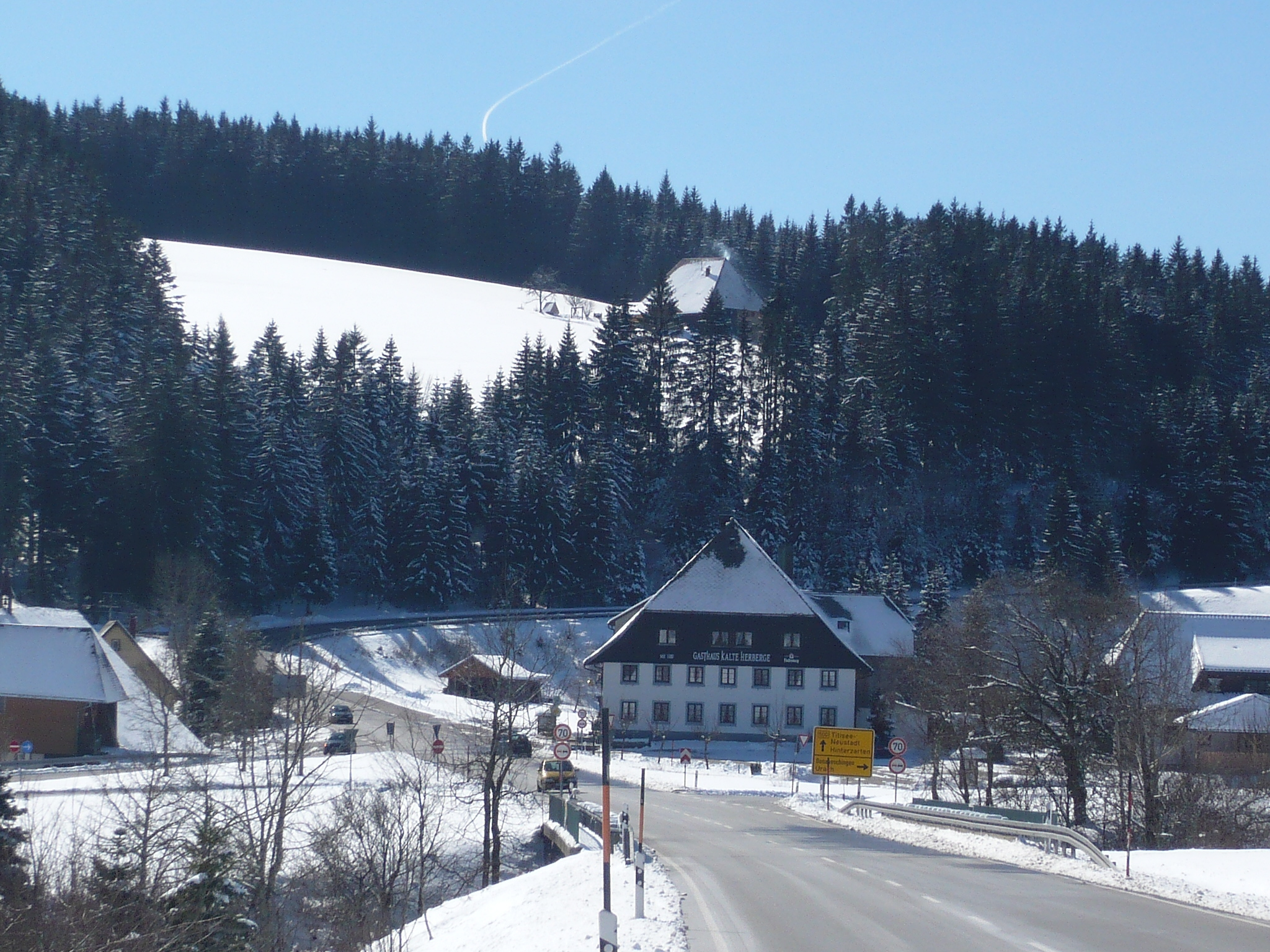 Kalte Herberge